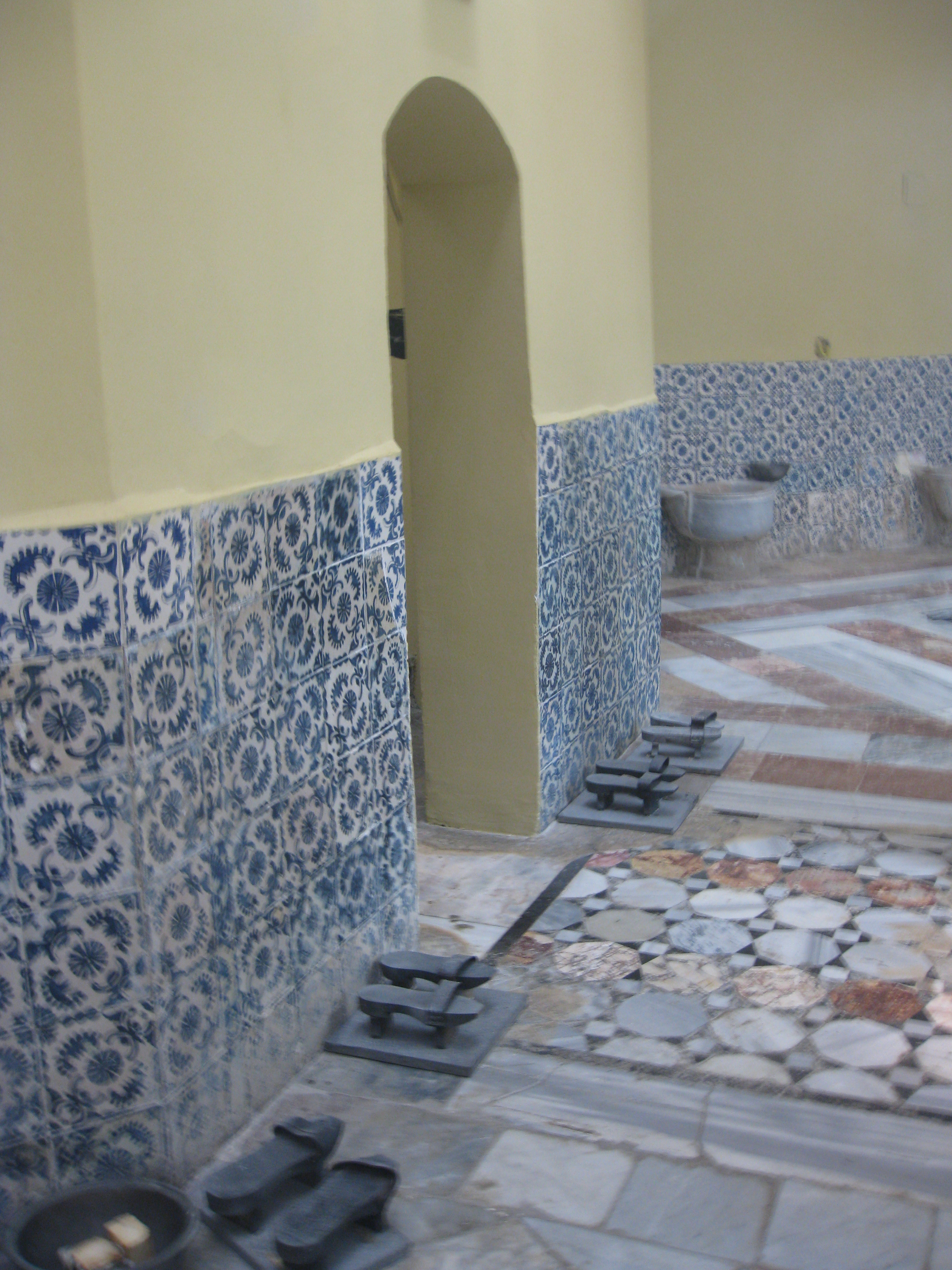 Acco (Acre, Akko) - Hamam el Basha (Hamam el Pasha) עכו חמאם אל באשה (חמאם אל פאשה) - בית המרחץ התורכי